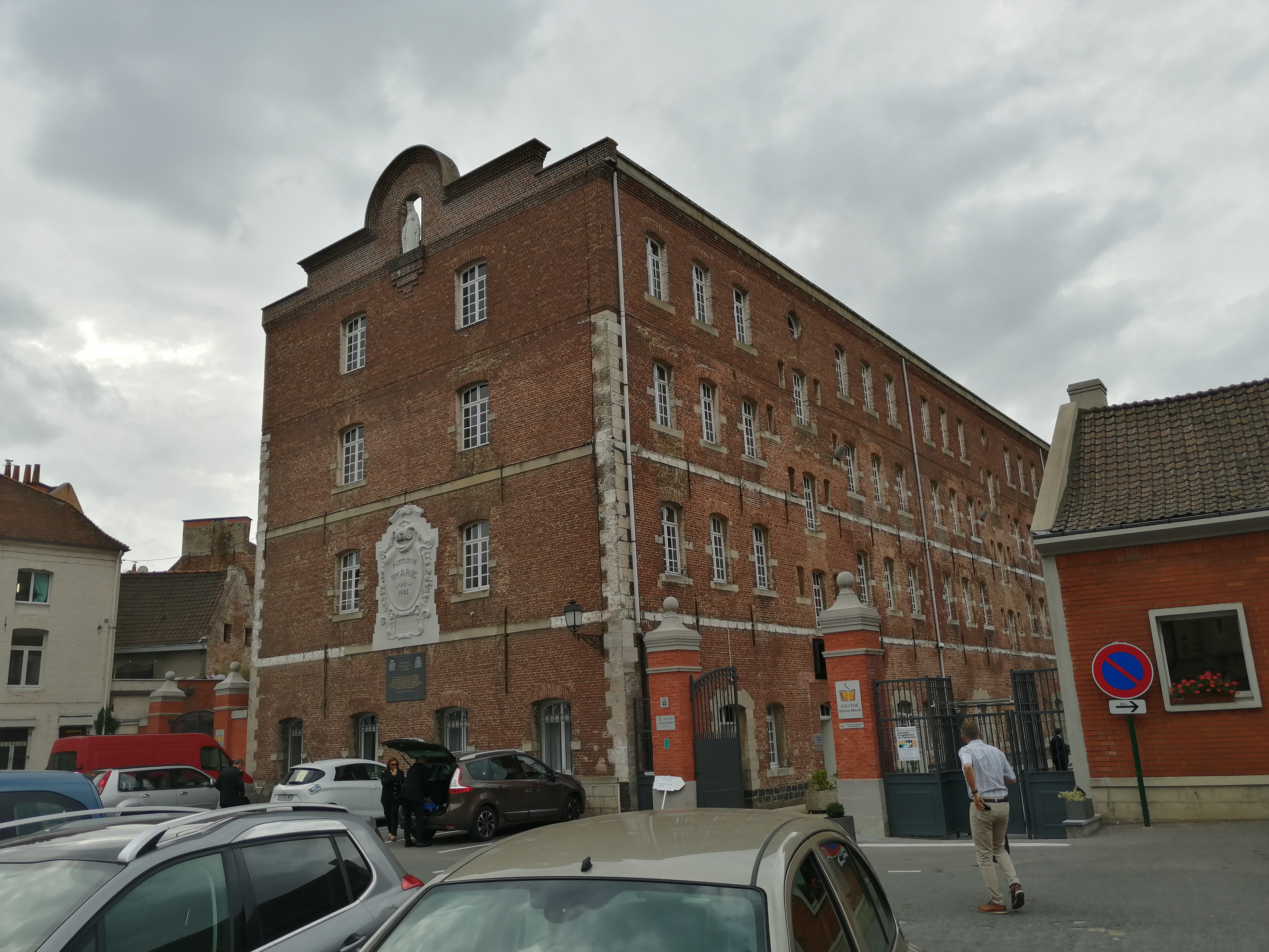 Vue depuis le square Bernanos, du collège Sainte-Marie